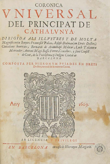 Primera pàgina Crònica Universal